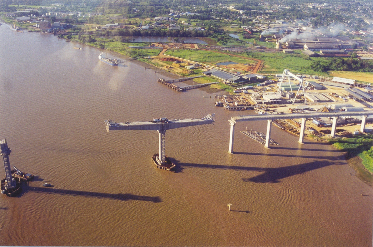 De brug over de Suriname rivier in aanbouw gezien vanuit de lucht. Foto: Magalhães (1999)